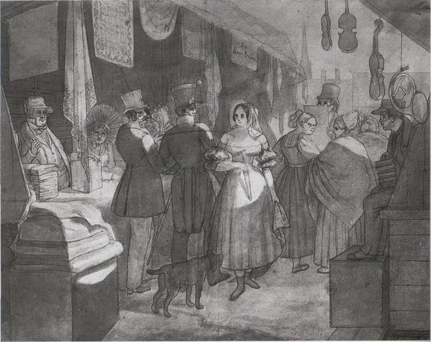 Genreszene von der Auer Dult. Die ihren Rock anhebende Frau im Vordergrund ist ein „leichtes Mädchen“.